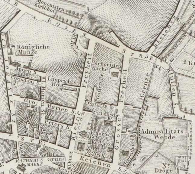 Kupferstich der Stadt Altona aus dem Jahr 1803 (Ausschnitt der Freiheit)